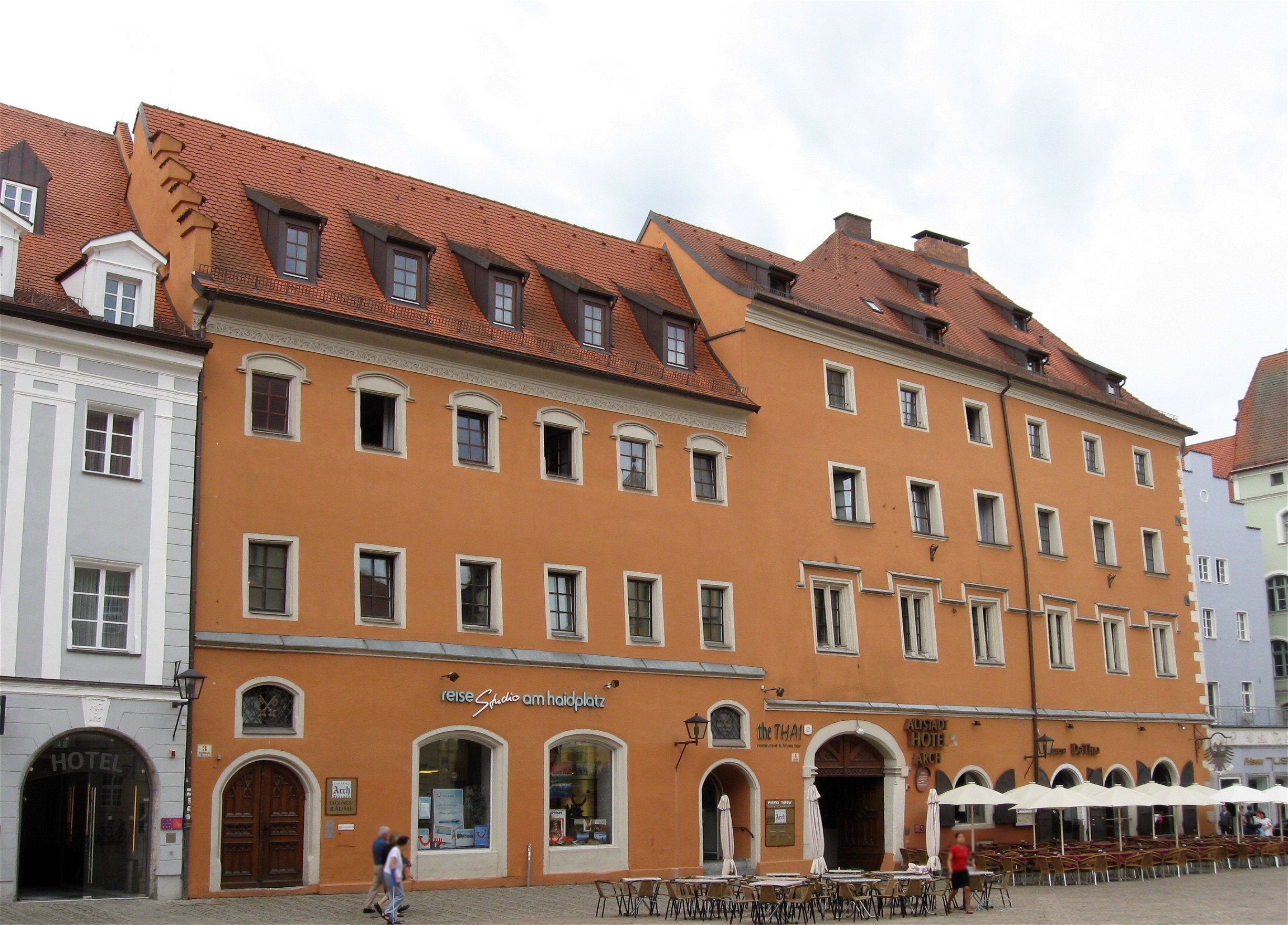 Haidplatz 3; Haidplatz 4. Hotel, ehem. Haus Zur Arch, drei- bis viergeschossige Vierflügelanlage mit Sattel- und Walmdächern, um 1300, Umbauten und Überformungen 15.-18. Jh. und 1863, Hofarkaden der Renaissance.